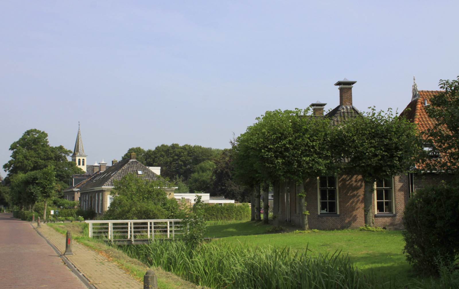 Rustig op straat in Gonga.